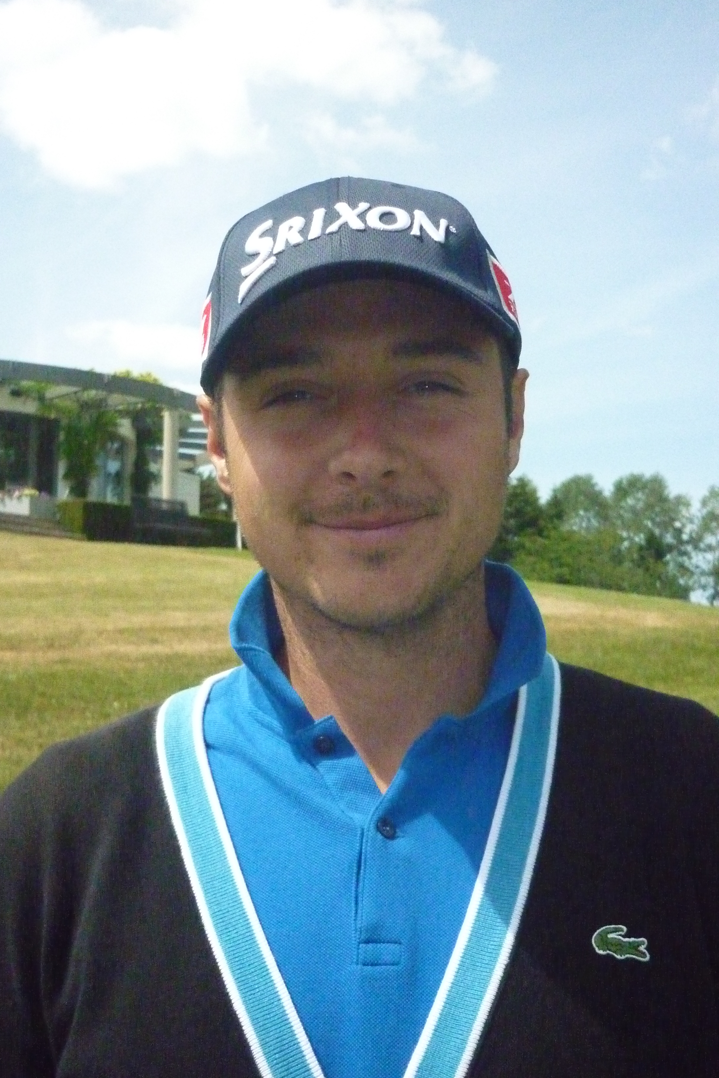 Julien Quesne op Telenet Trophy